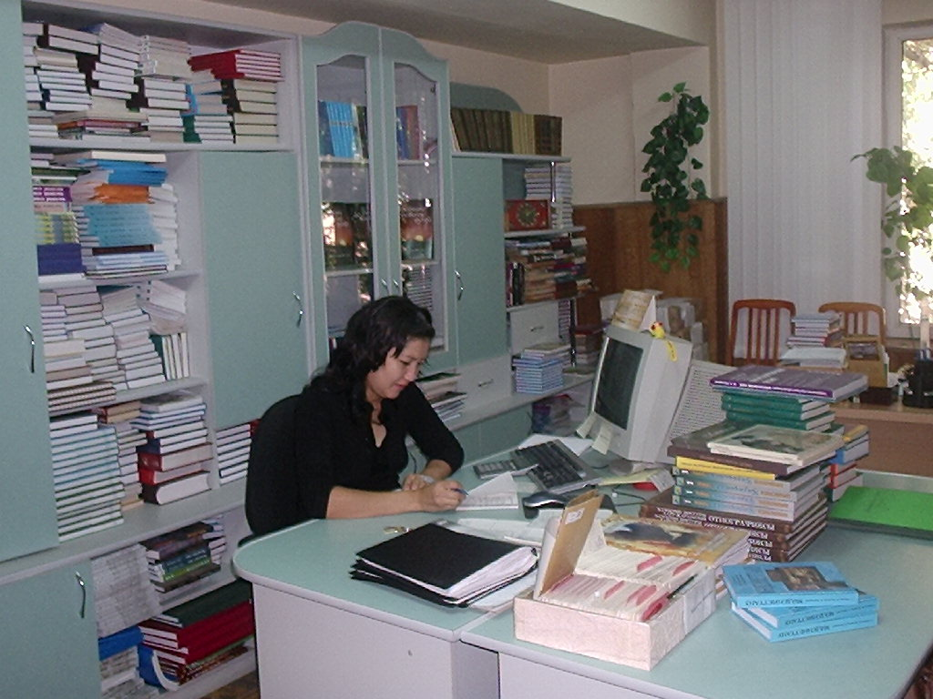 Кітап оңдеу бөлімі